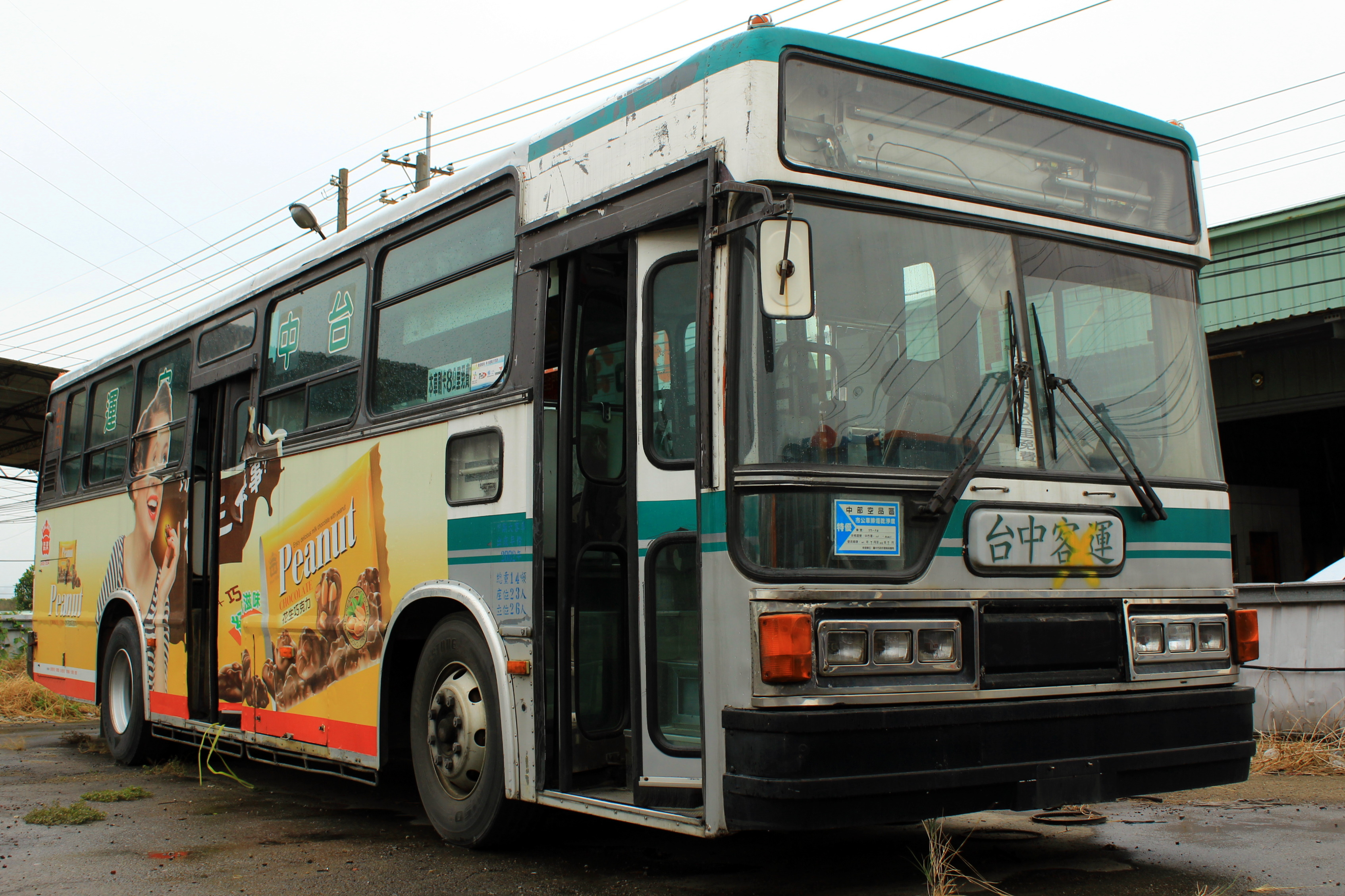 臺中客運報廢的2002年原首都客運日野ERK2JML大客車571-FQ，停在臺中客運烏日停車場。